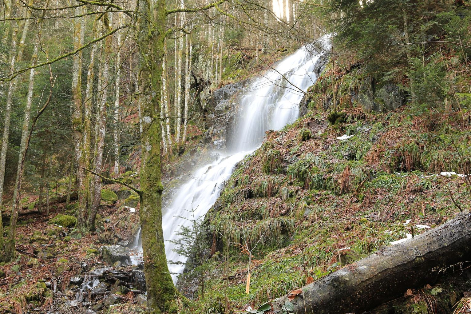 Cascade prise en Janvier.